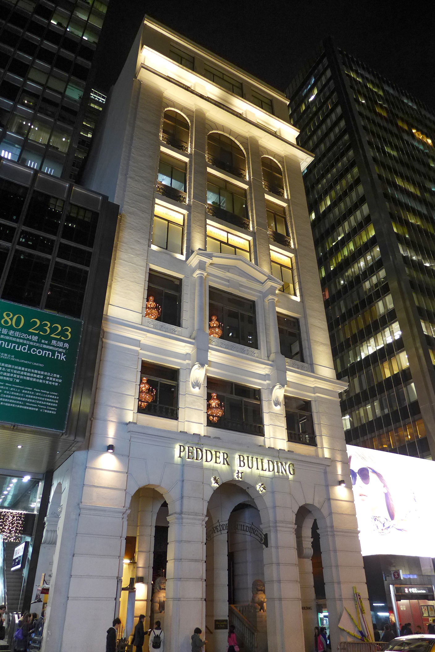 Pedder Building